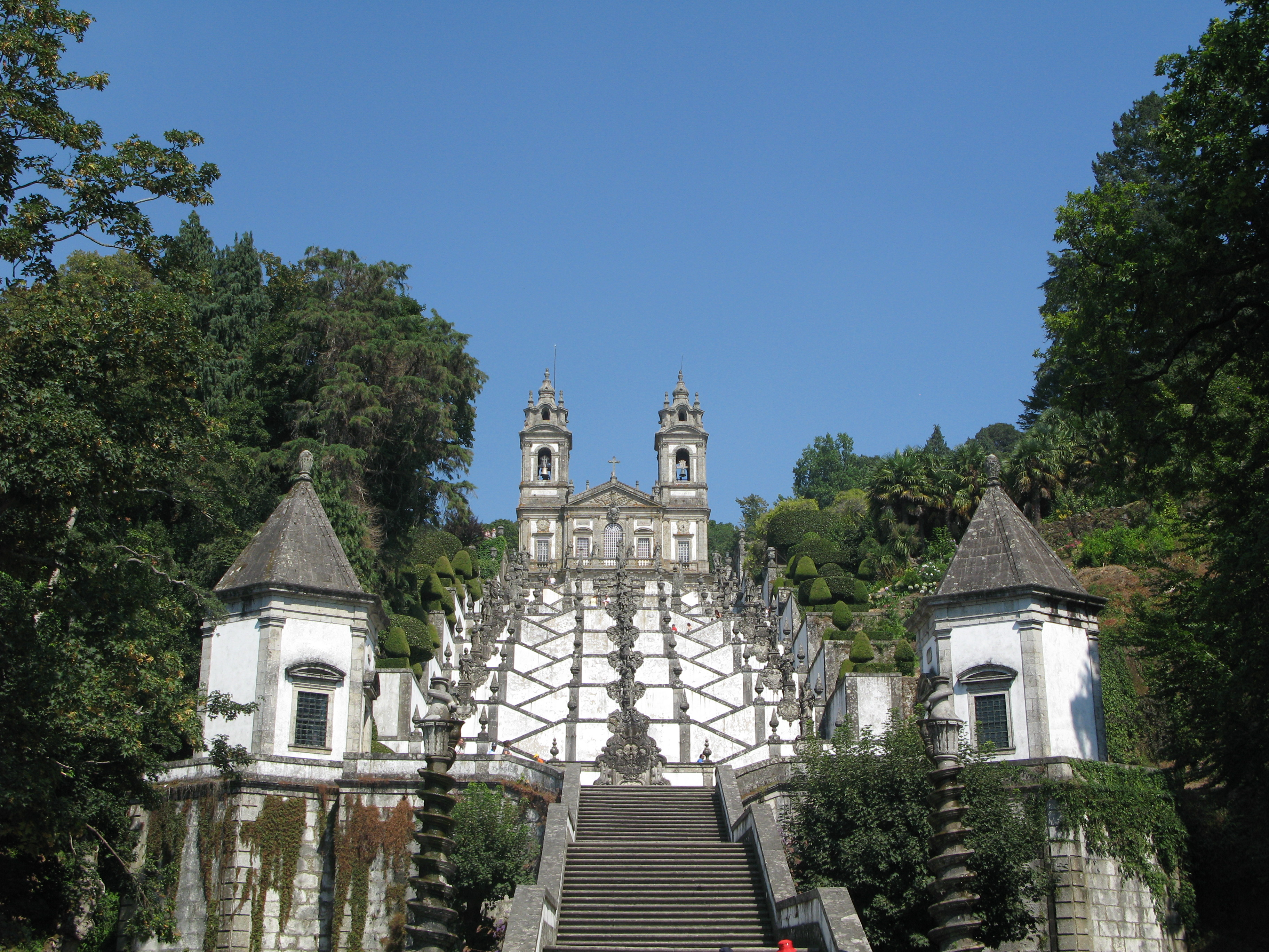 Igreja de Bom Jesus, e parte do Terreiro de Moisés, localizados no Santuário de Bom Jesus do Monte, em Braga.